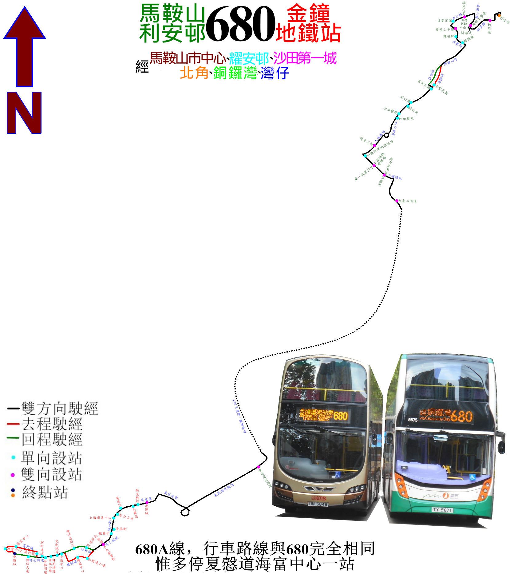 中文（香港）: 過海隧巴680線的走線圖